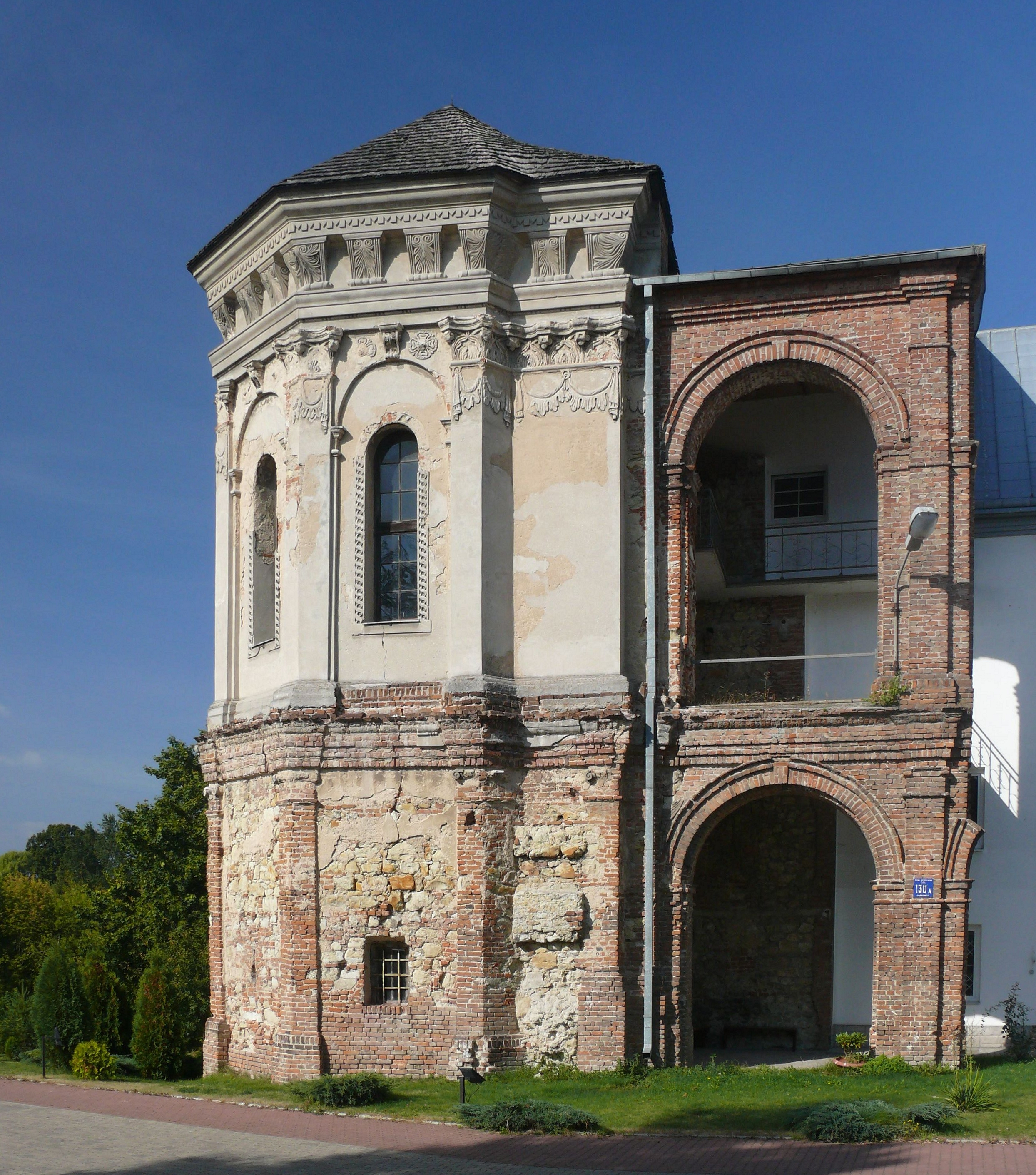 Ruiny pałacu Firlejów w Dąbrowicy